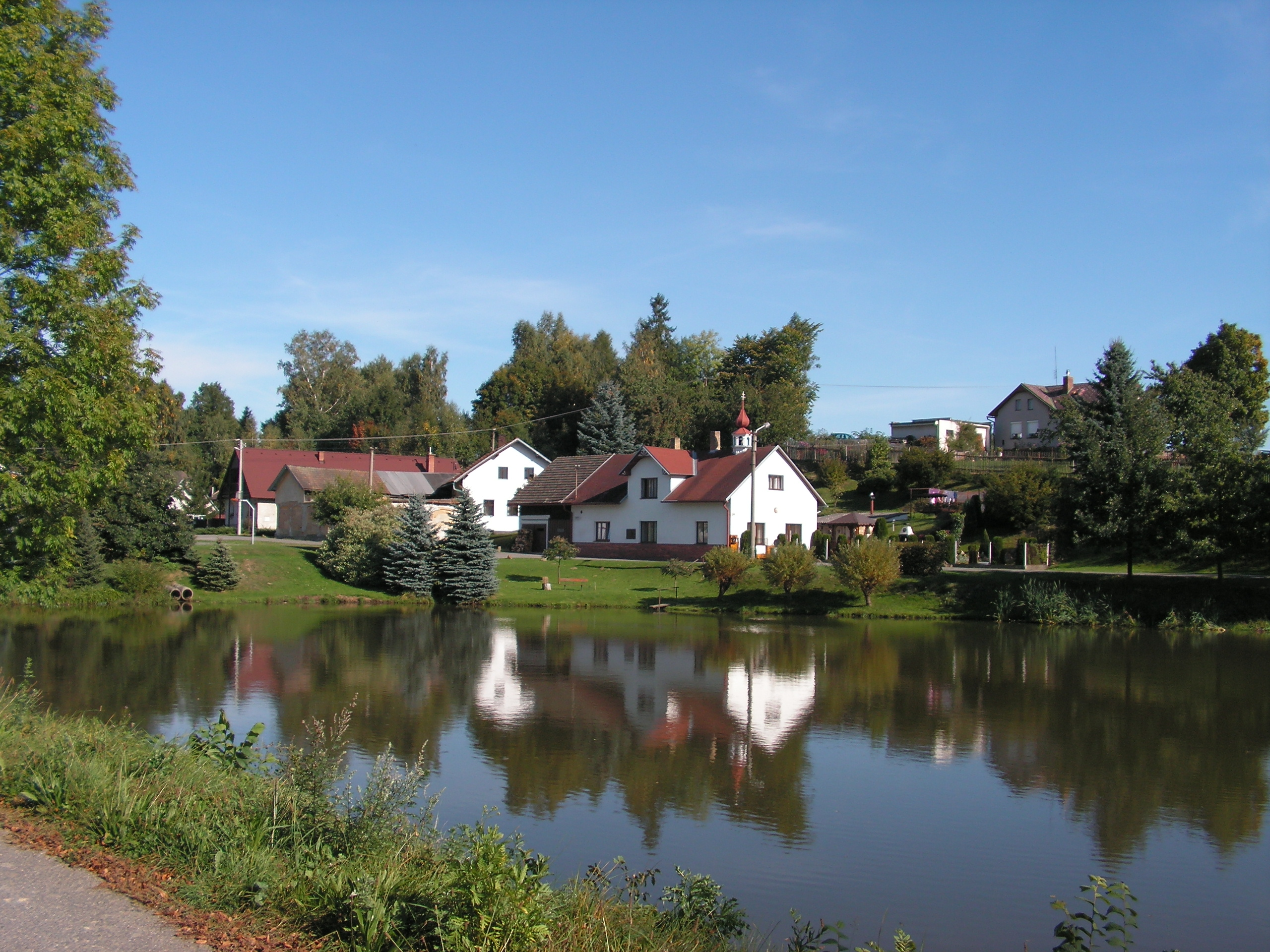 Pohled na rybník v obci Bartoušov, která se nachází v okrese Havlíčkův Brod.